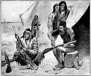 Illustration in Der Sohn der Wälder. Von Max Felde. Mit 26 Abbildungen von W. Zweigle. Achte Auflage. Stuttgart, Berlin, Leipzig, Union Deutsche Verlagsgesellschaft. (ca. 1918). Die erste Auflage ist 1905 erschienen.